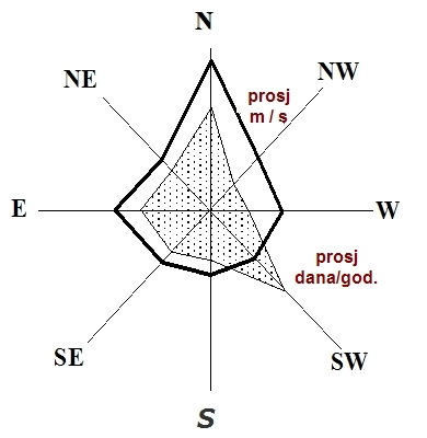 prikaz ruže vjetrova